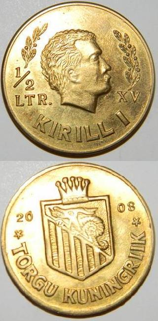 Torgu "kirill" 2008